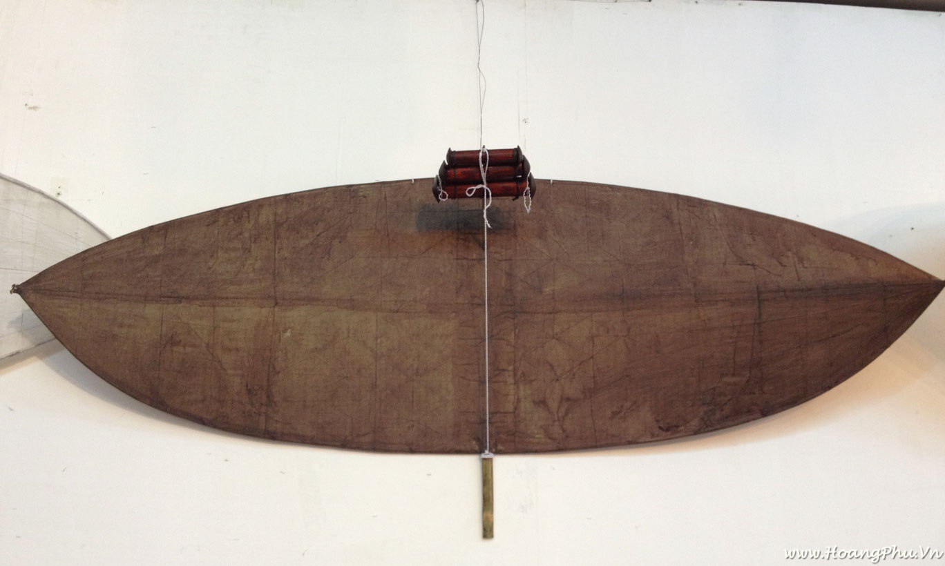 Diều Sáo Cổ